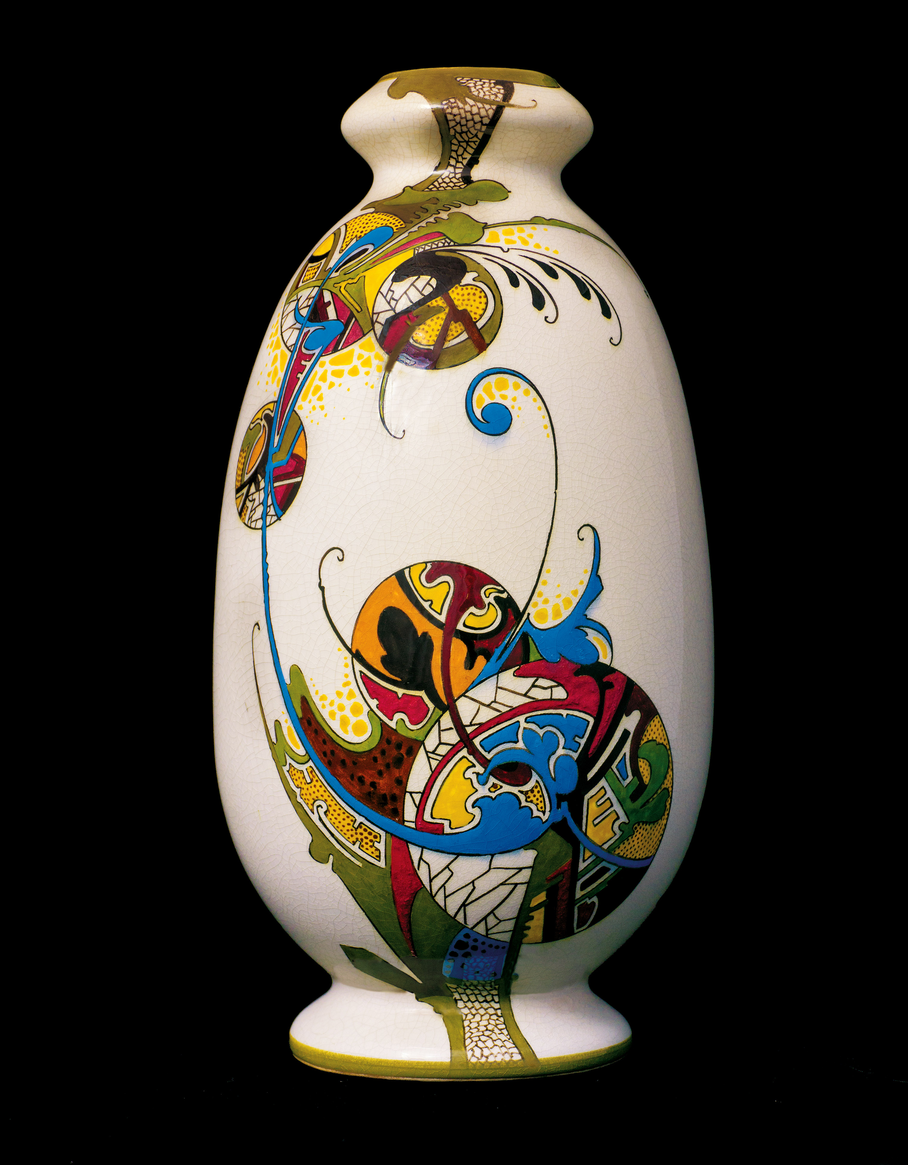 Een voorbeeld van een vaas van de Porceleinfabriek De Kroon uit Noordwijk